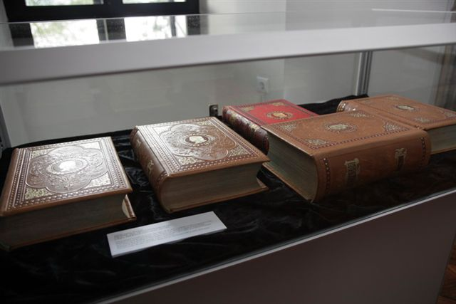 Ponatis Slave vojvodine Kranjske iz leta 1877